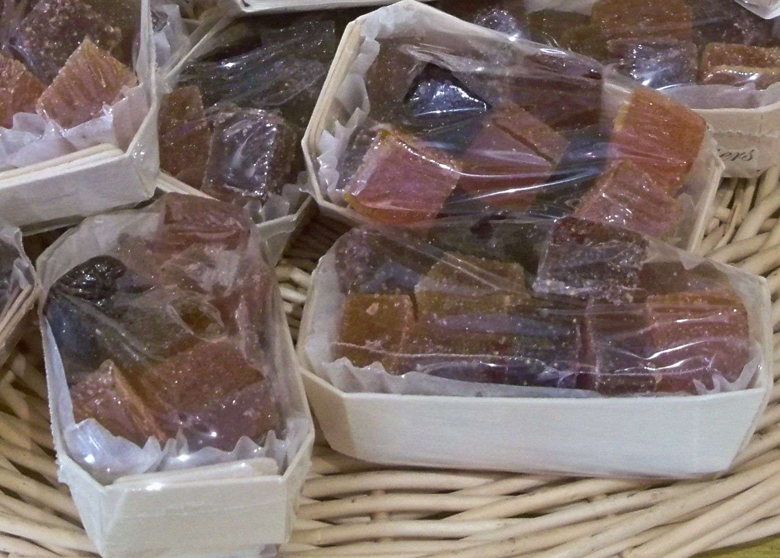 Pates de fruits vauclusienne